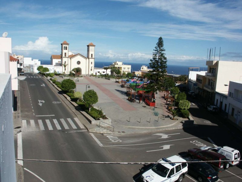 Vista de la plaza de la Atalaya. Santa María de Guía, Gran Canaria. Islas Canarias, España.